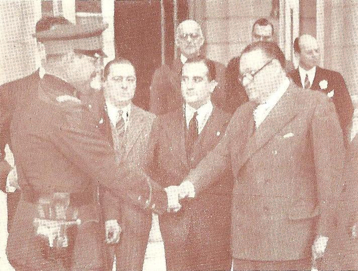 Roberto M. Ortiz, Presidente renunciante de la República Argentina, se despide de un agente de su custodia personal.